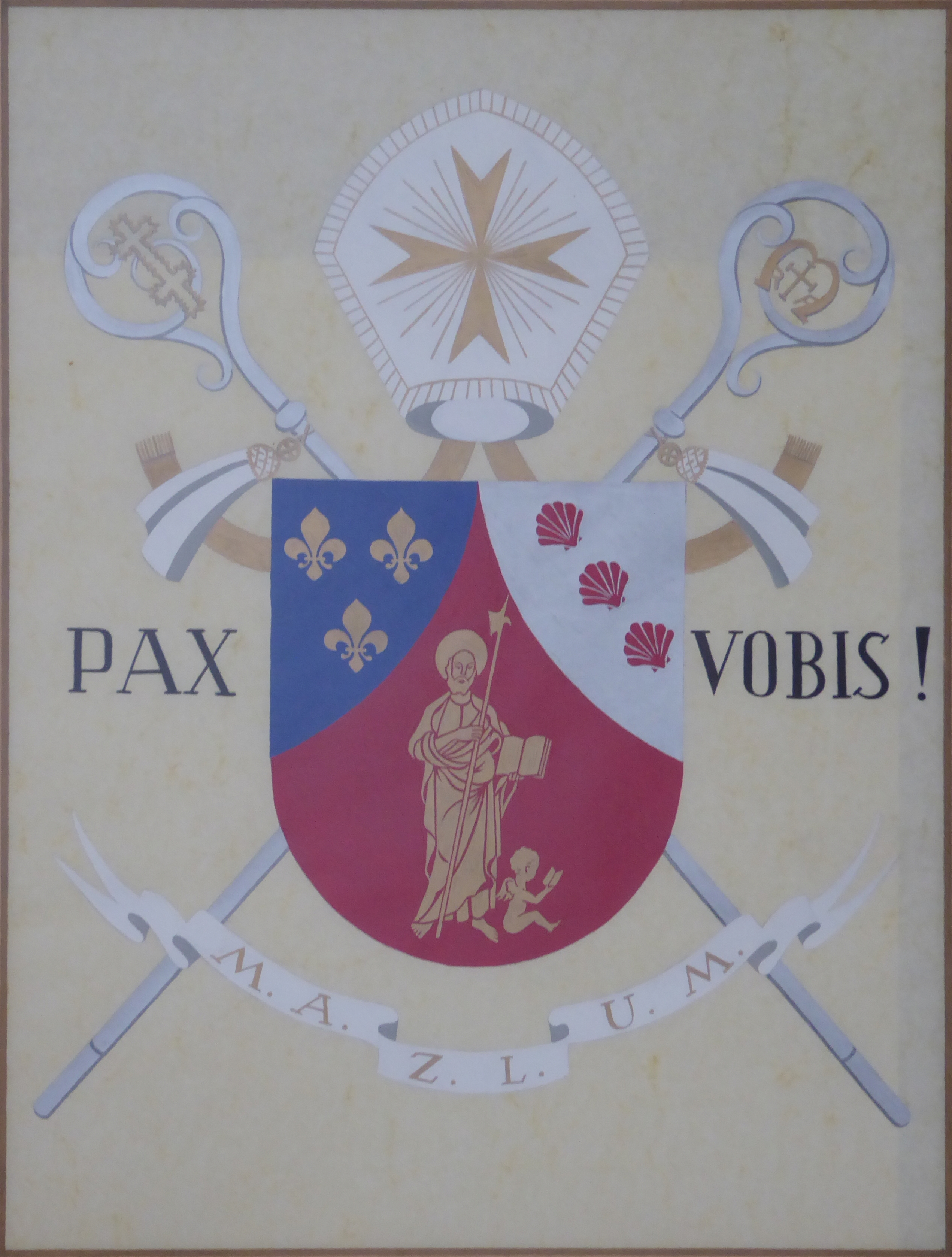 Stift Lilienfeld, Niederösterreich - Wappen von Abt Matthäus Nimmervoll (beim Museum)